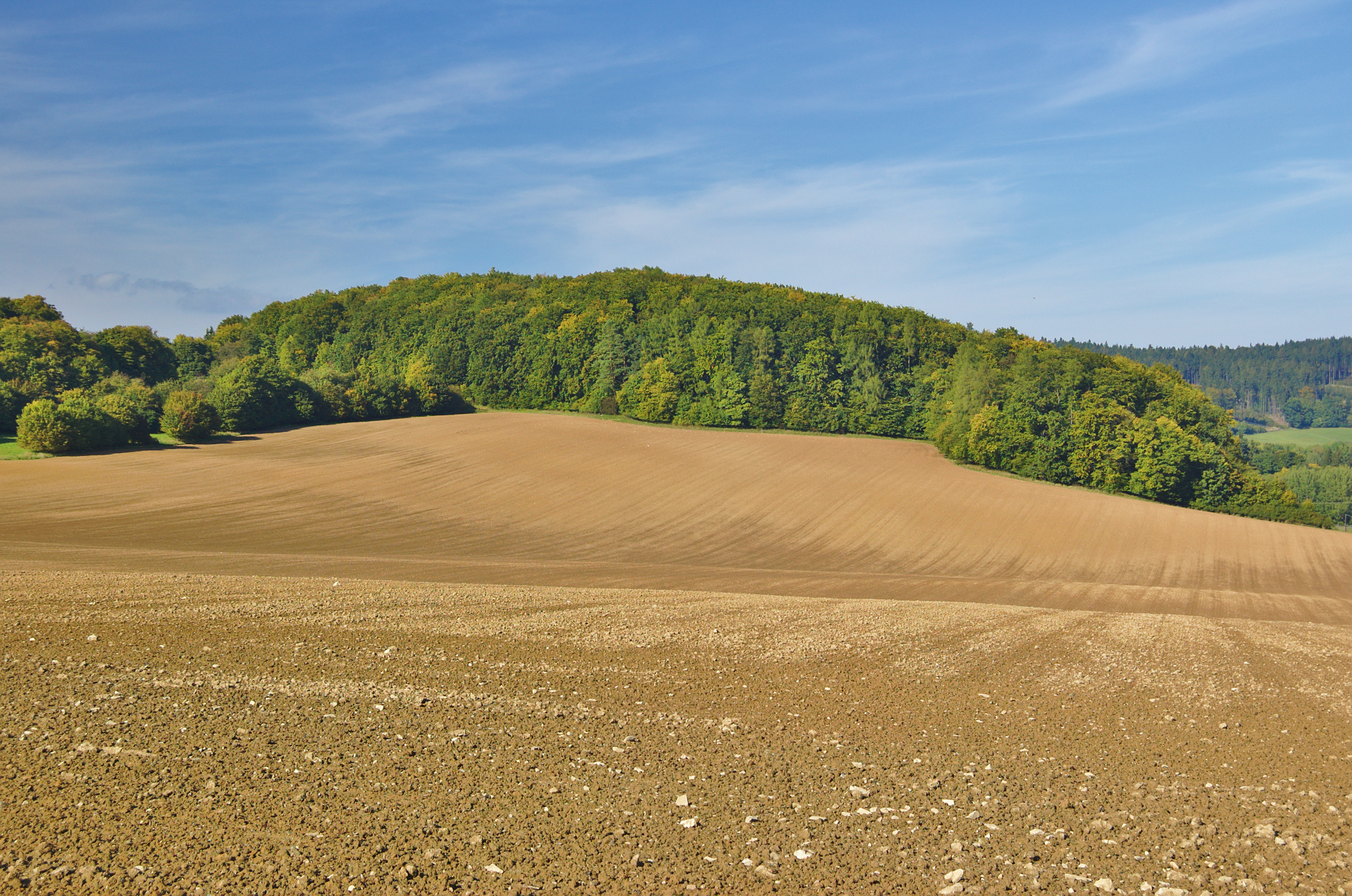 Přírodní rezervace Průchodnice - pohled od křižovatky "Na srdénku", okres Prostějov